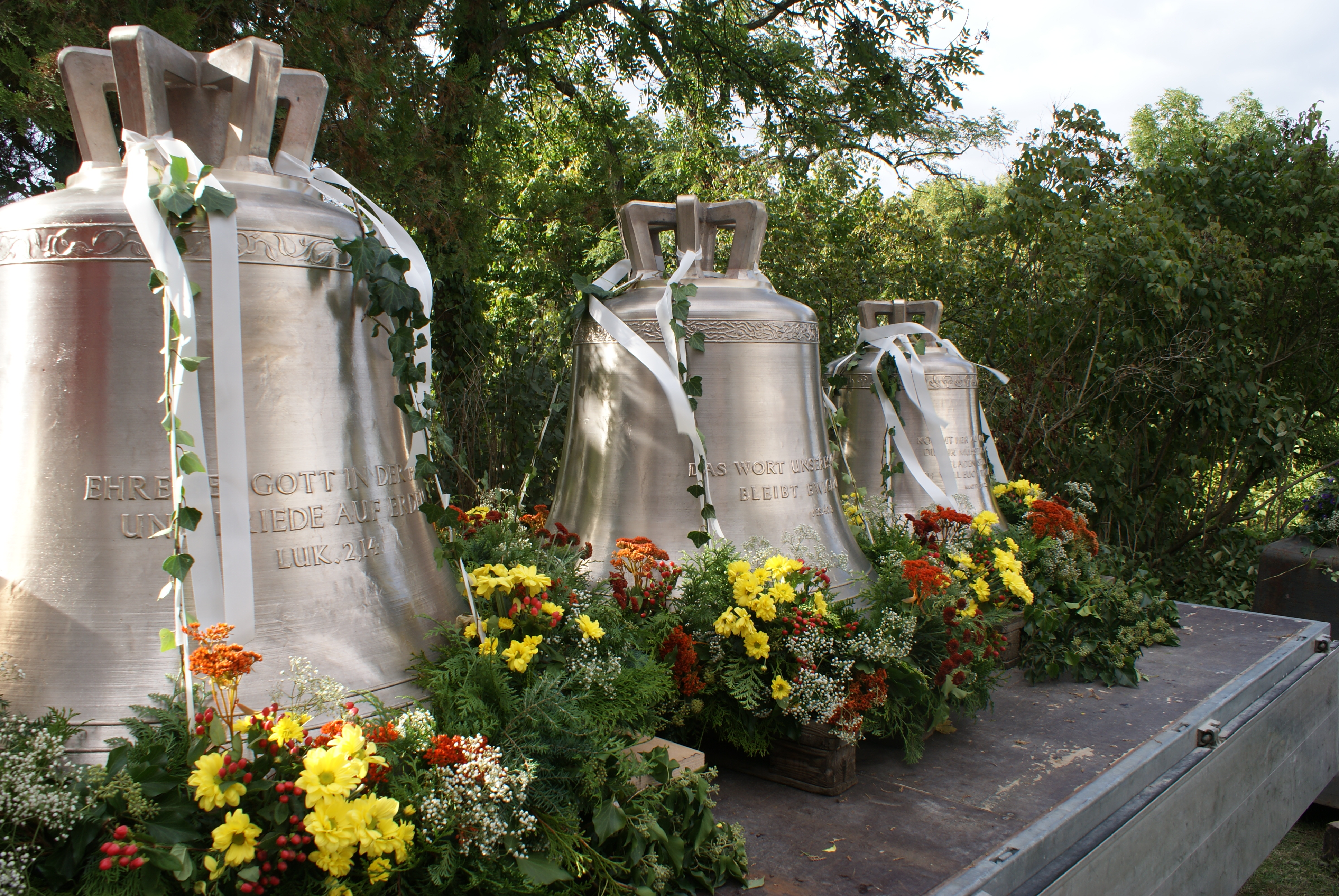 Das neue Wahrener Geläut anläßlich des Glockenweihe-Wochenendes 21.09.-23.09.2012